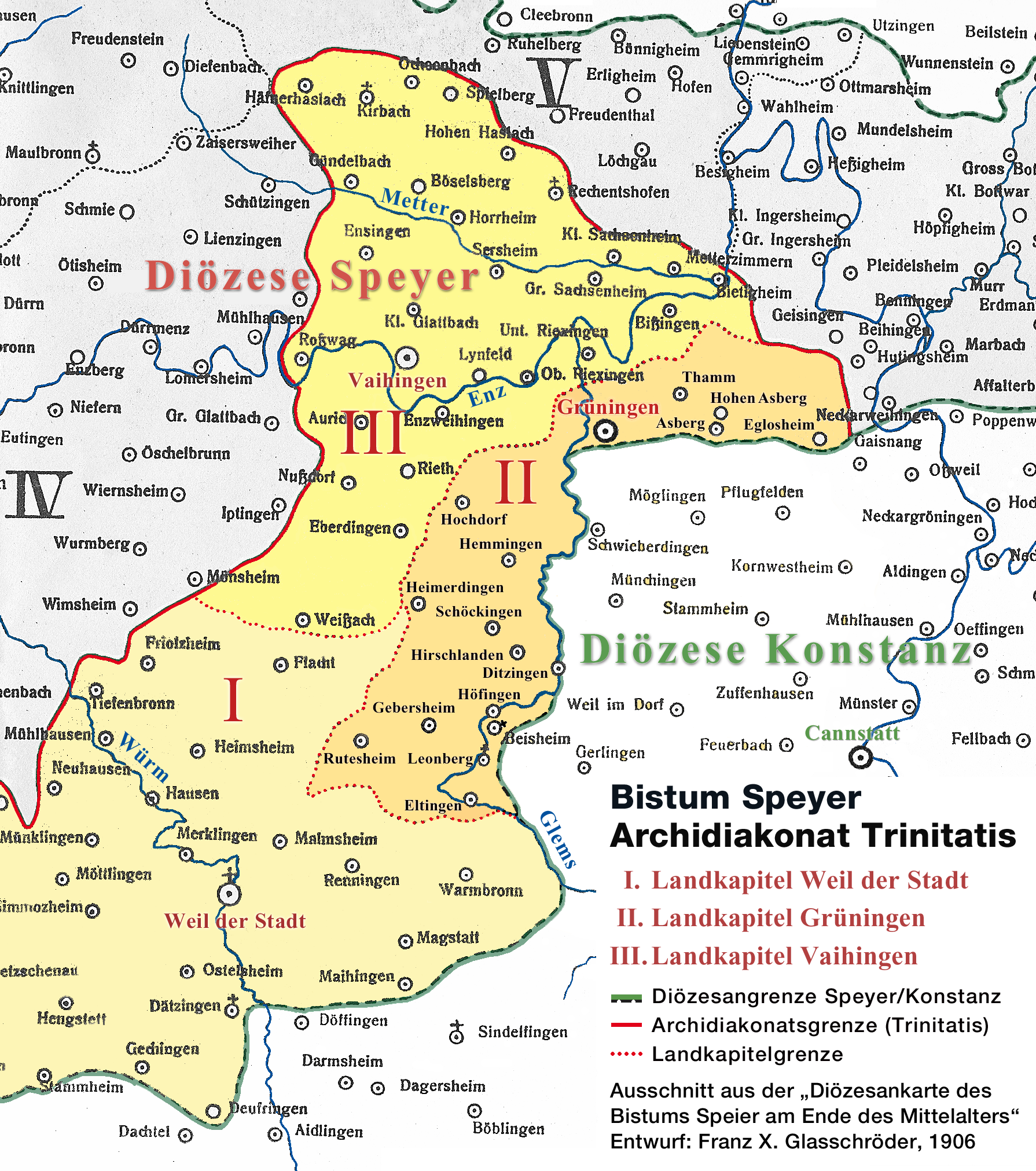 Karte des Landkapitels Vaihingen im Speyrer Archidiakonat Trinitatis (um 1500)